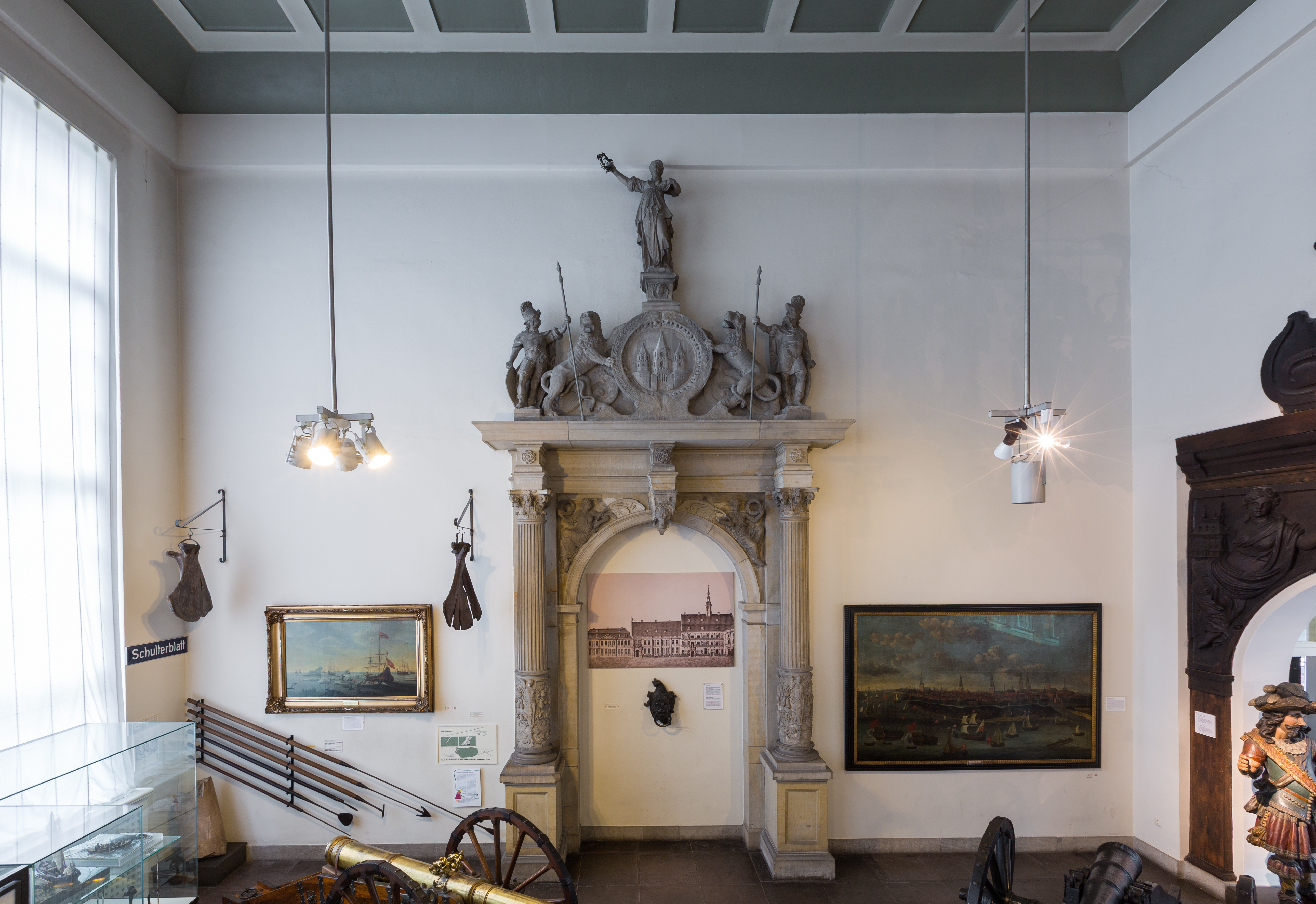 Das Portal stammt vom Rathaus an der Trostbrücke. Es bildete dort die "kleine" Rathaustür zum Anbau des Gebäudes von 1601.